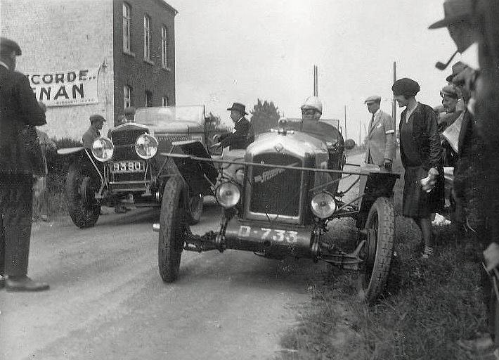 Départ du Circuit de Thuin, juin 1926 (Georges Bourianou au départ).